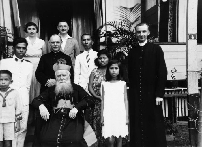 Foto. Groepsportret met monseigneur Bos in Bandjermasin